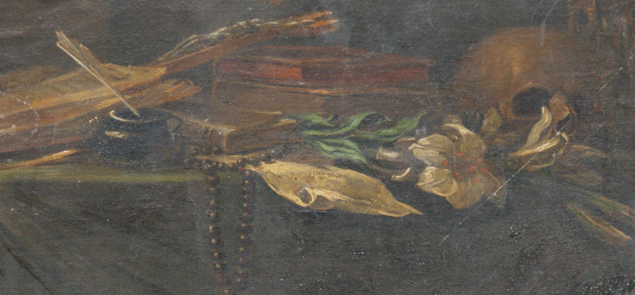 Sygnatura na obrazie "Wizja Św Antoniego Padewskiego" na podstawie, której udało się zidentyfikować autora obrazu w kościele św Antoniego we Wrocławiu